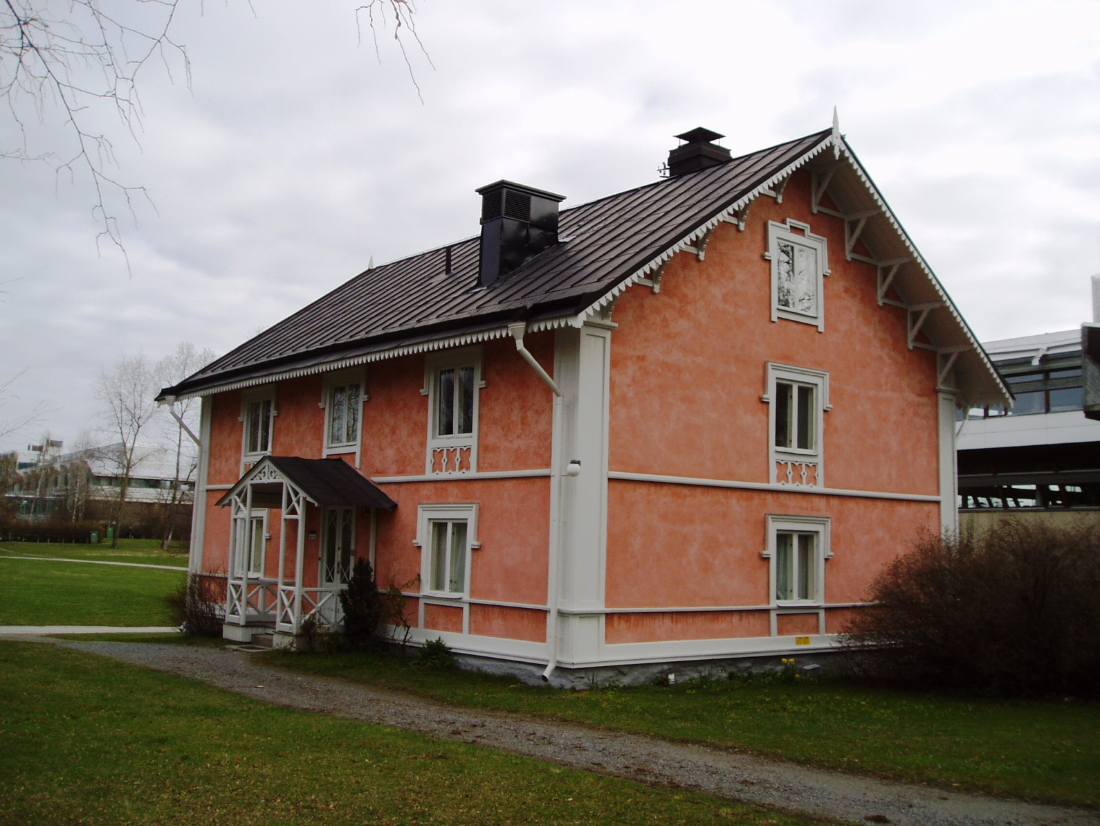 Villan Skära, Frescati, University Stockholm